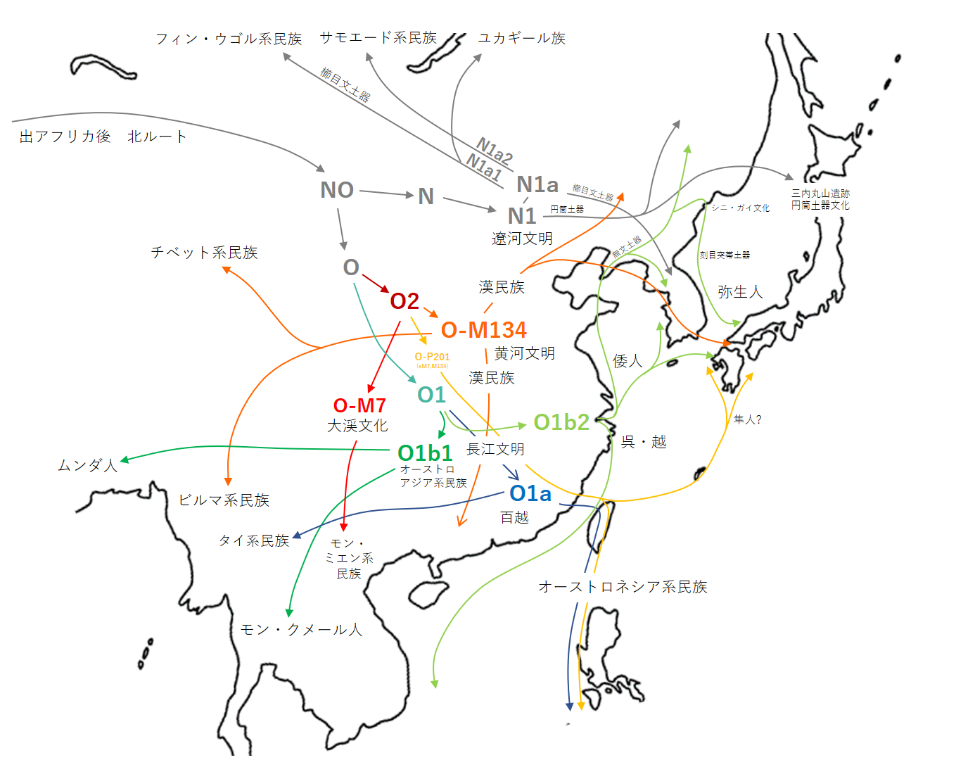 ハプログループO,N (Y染色体) に関連する東アジアの民族移動